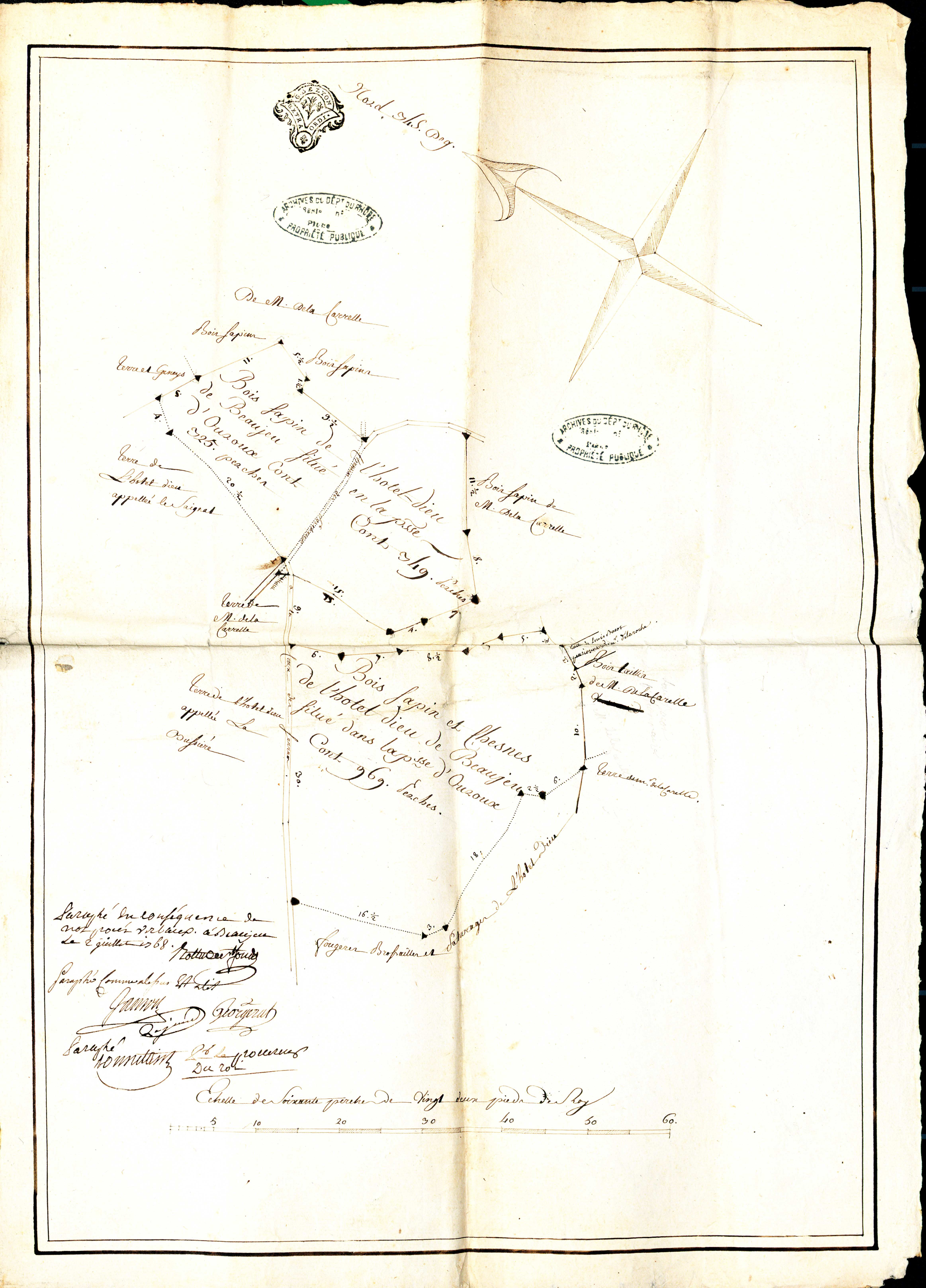 ADRML, 5 B 37.